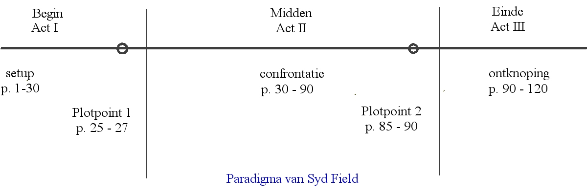 Paradigma van scenariogoeroe Syd Field